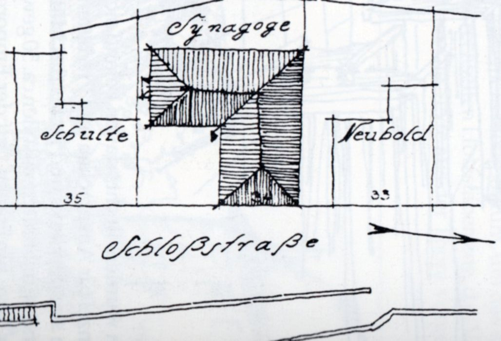 Lageplan der Synagoge in Arnsberg von 1912